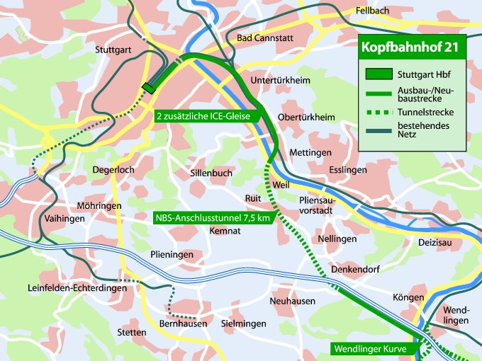 Schematische Darstellung für den NBS-Anschluss beim Projekt Kopfbahnhof 21